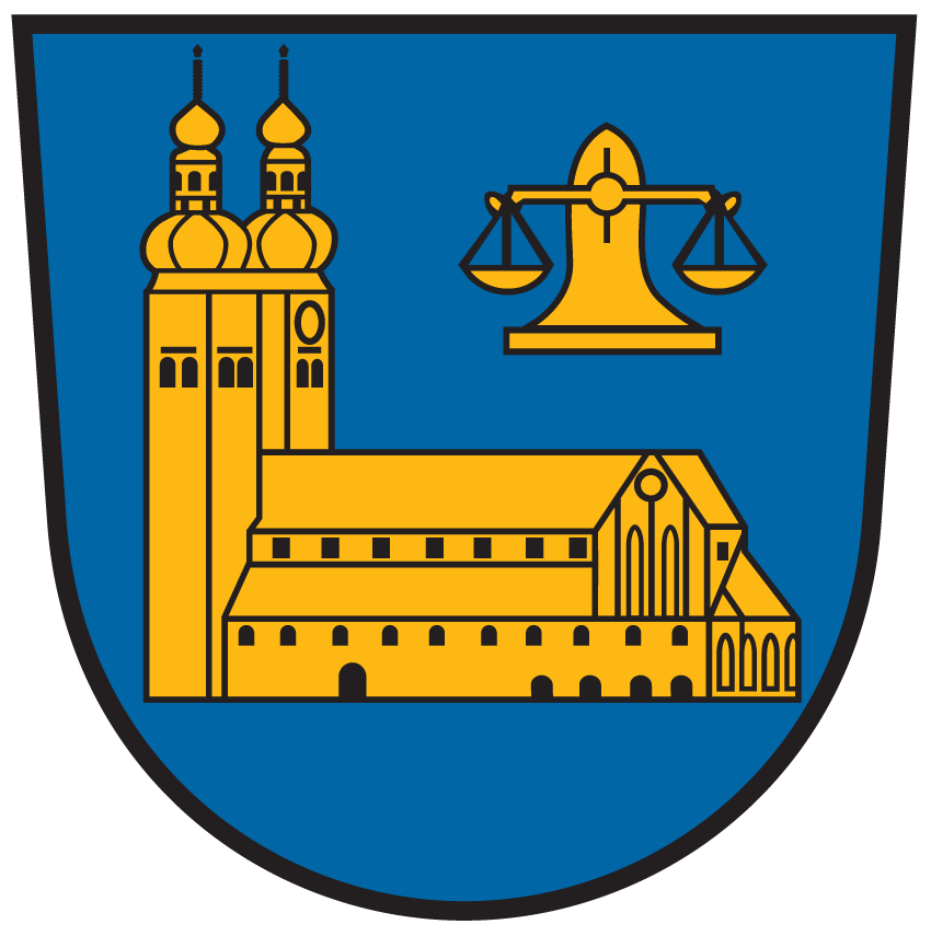 Wappen von Gurk